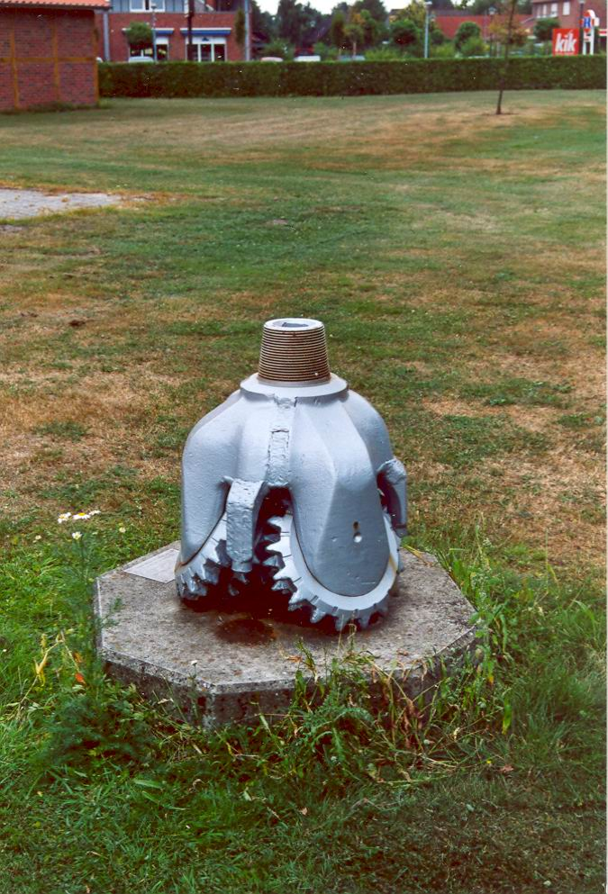 Rollenmeißel, wie sie der Bohrung nach Erdöl dienen